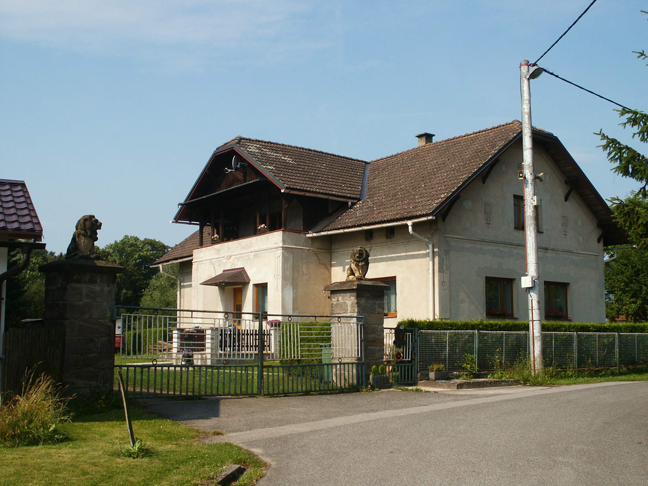 Všeliby - č.p. 3, vila